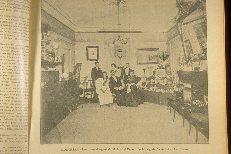 Les noces d'argent de M. le chef Benoit, de la brigade du feu, Le Monde illustré, vol. 13 no 656. p. 487 (28 novembre 1896)